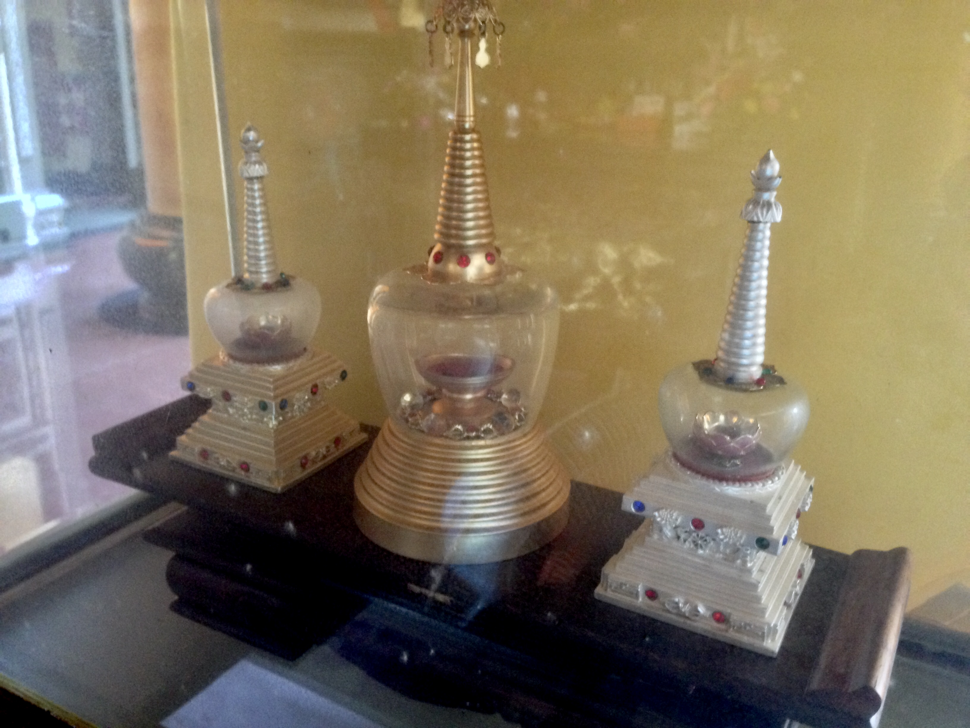 中文（台灣）: 大庄慈雲寺黑米